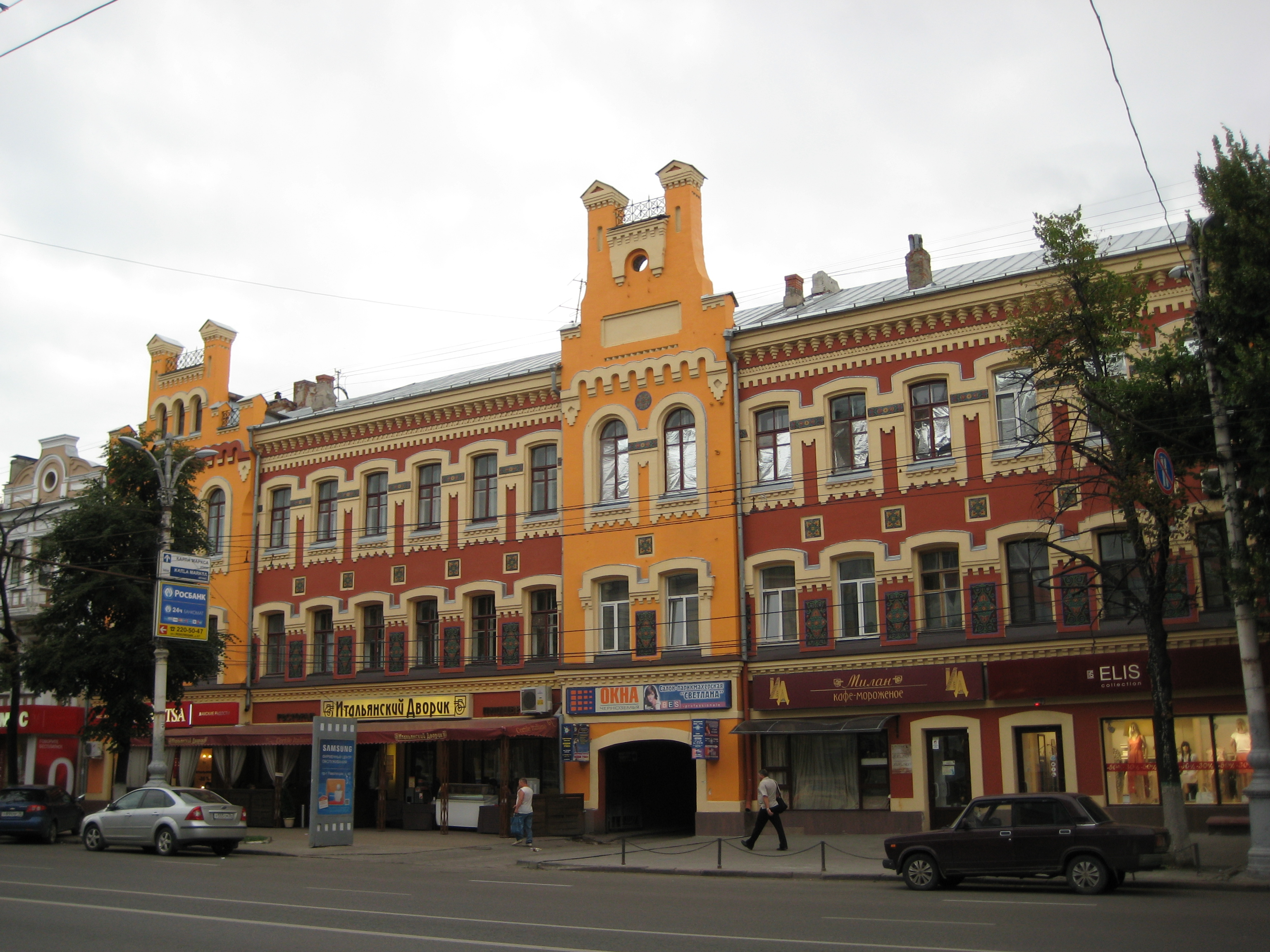 Voronezh. Revolution Avenue (The Noble Street), Building 44. The building of the former Hotel Samofalova. Monument of history and architecture of the late 19th century.